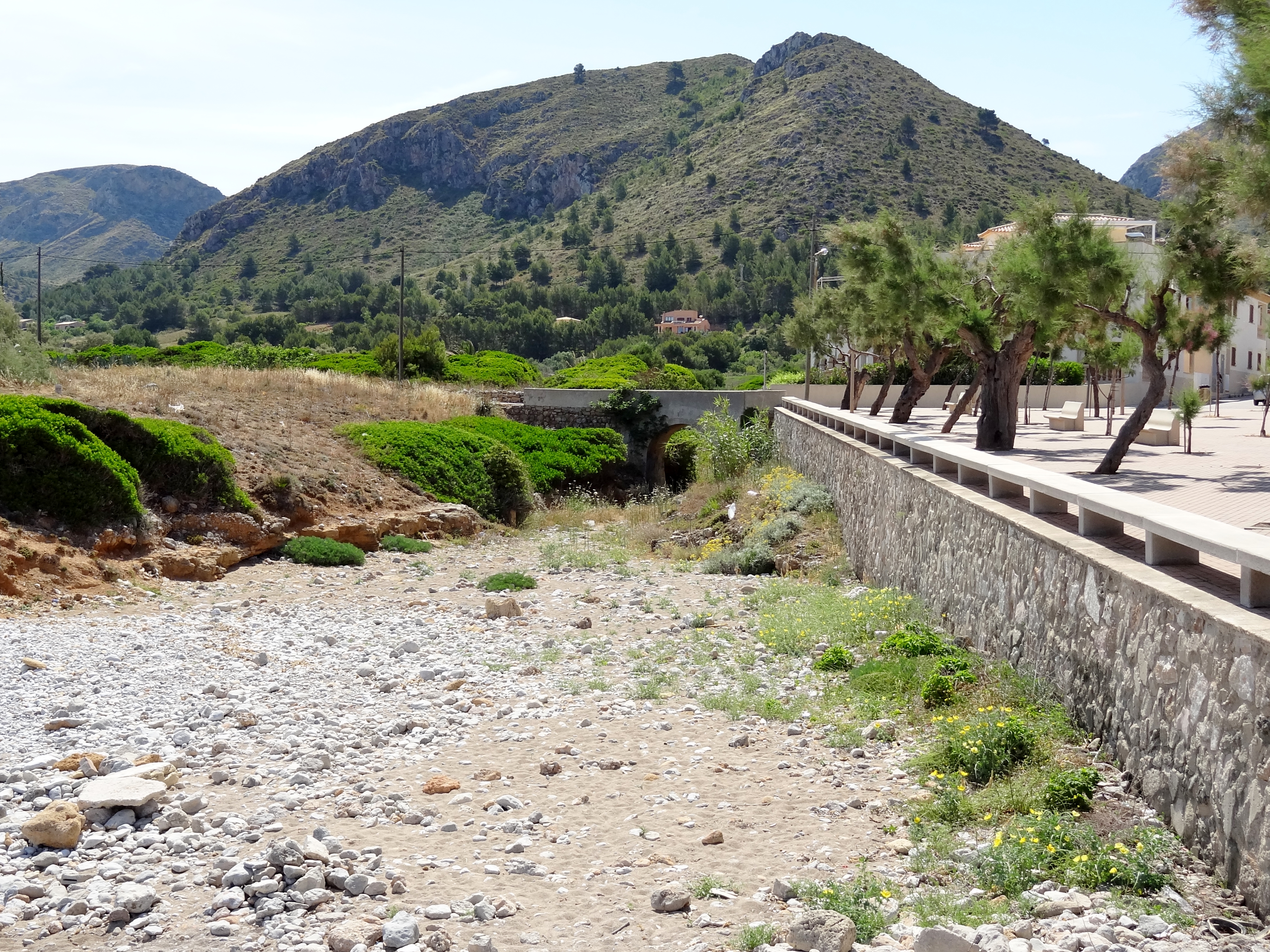 Caló des Parral, Gemeinde Artà, Mallorca, Spanien